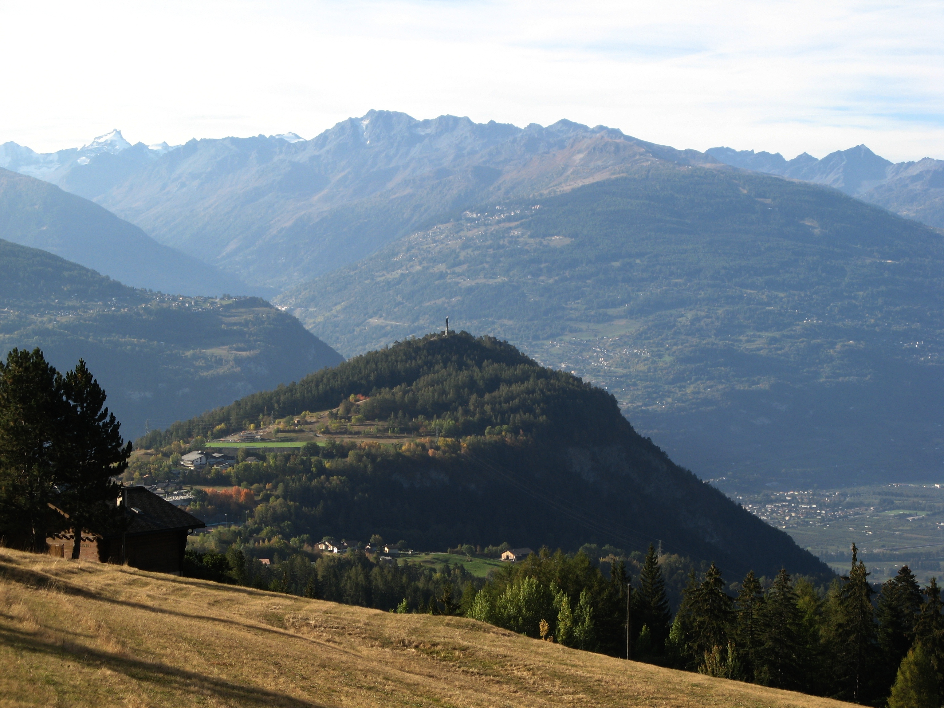 Colline du Châtelard